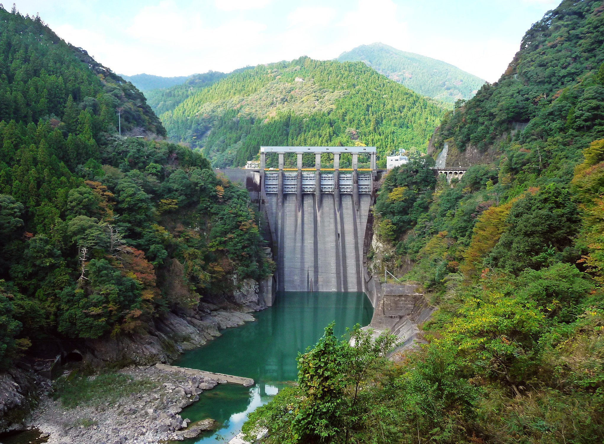 長安口ダム